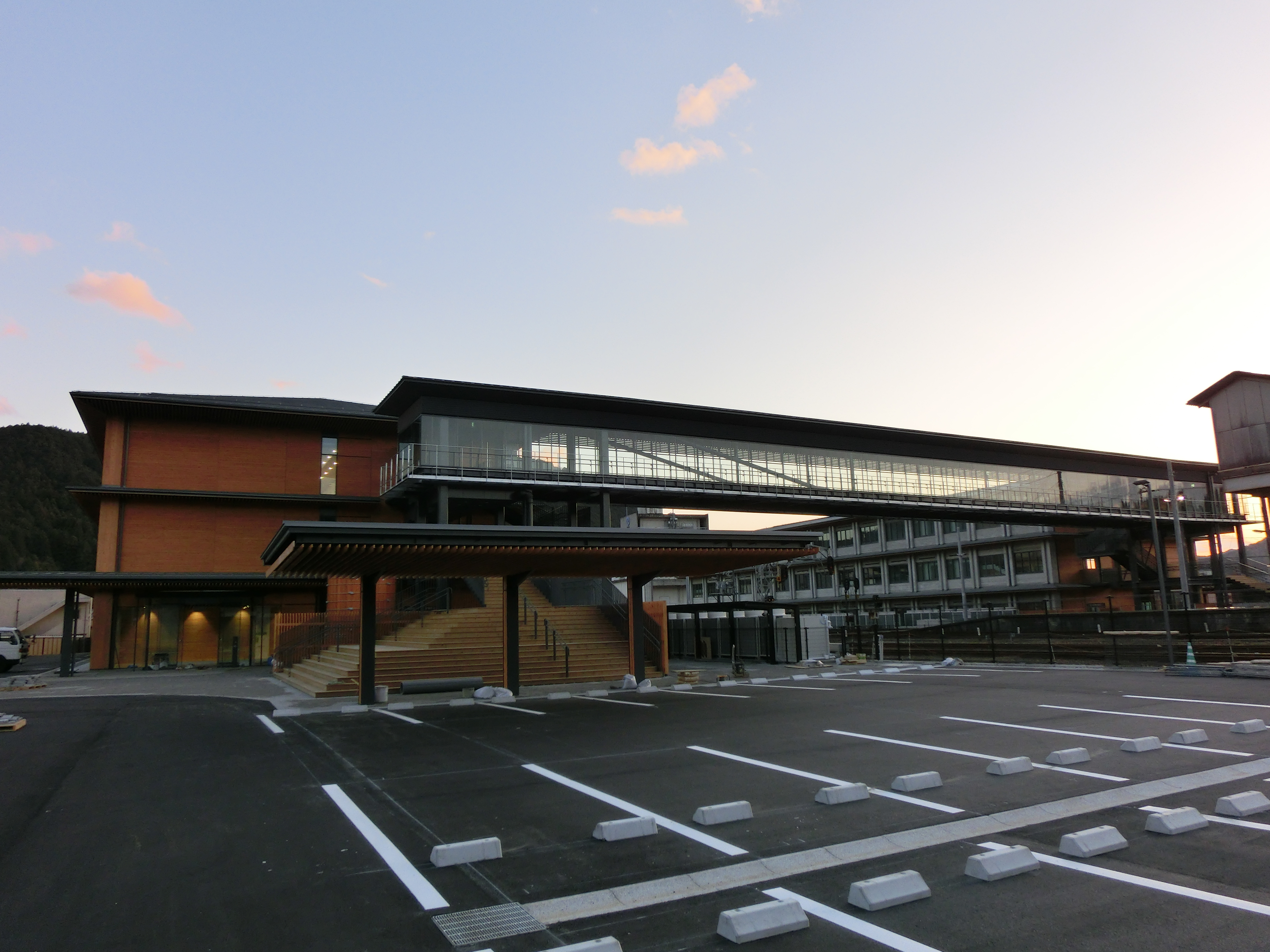 四万十町役場